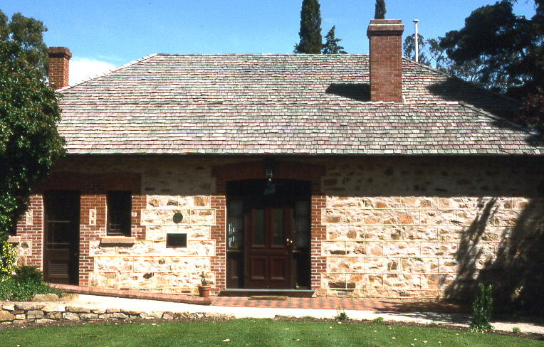 old gov. house, adelaide, australia